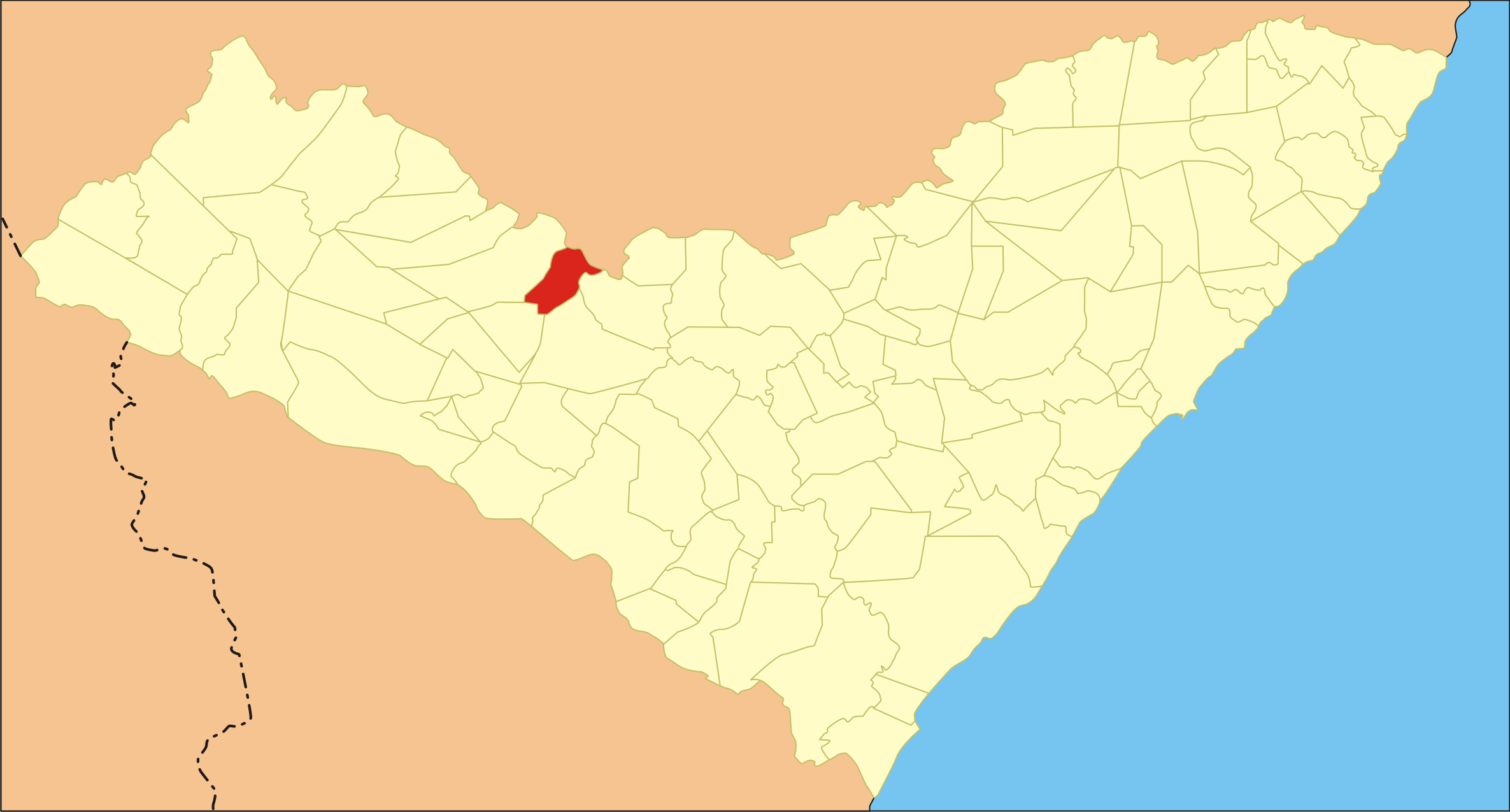 Localização da cidade em Alagoas